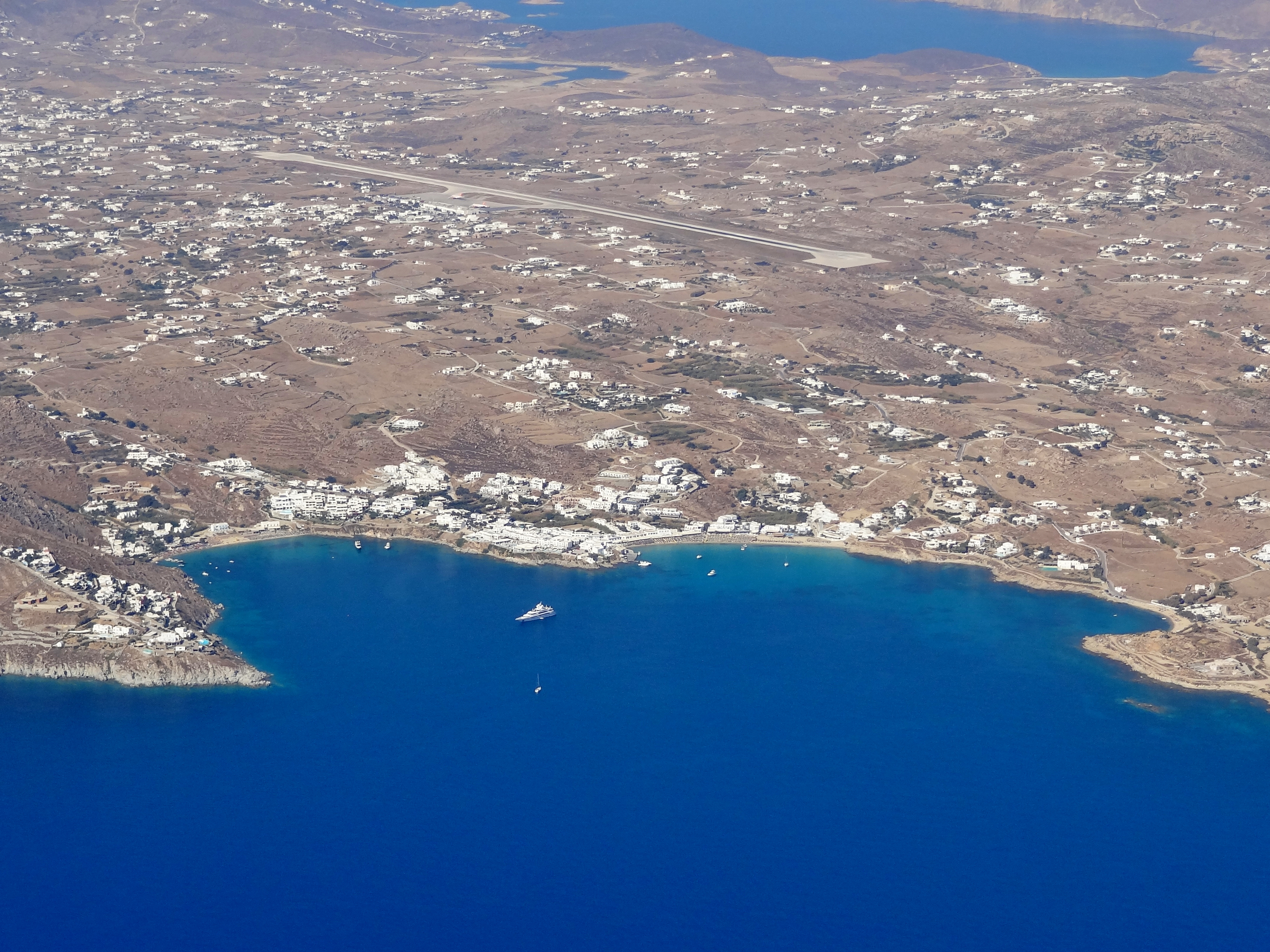 Küste bei Platis Gialos auf Mykonos, Kykladen, Griechenland